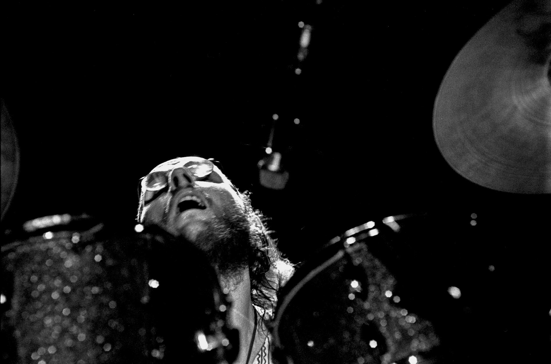 Gentle Giant, Musikhalle Hamburg, April 1974: John Weathers (dr)